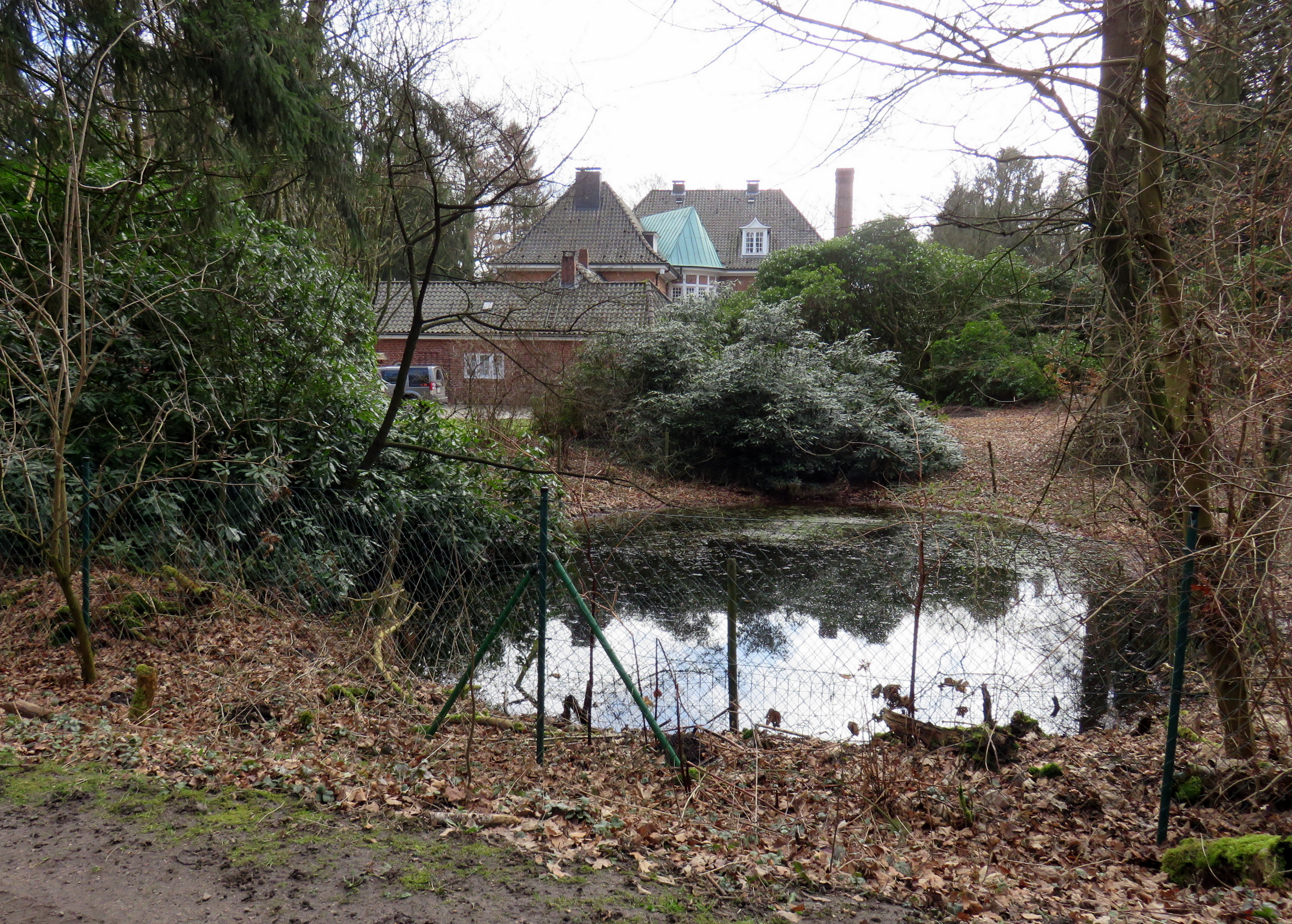 Landhaus Duvenwischen 70 Ecke Im Uhlenbusch in Hamburg-Volksdorf, erbaut 1910/1911 This is a photograph of an architectural monument. (941)